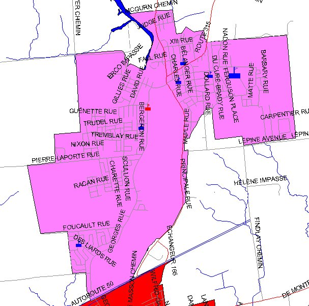 Auteur : moi, Louis-Marie Poissant, alias ColocaTerre. C'est une carte montrant le village urbain Vallée-de-la-Lièvre, à Gatineau (l'ancien Buckingham)